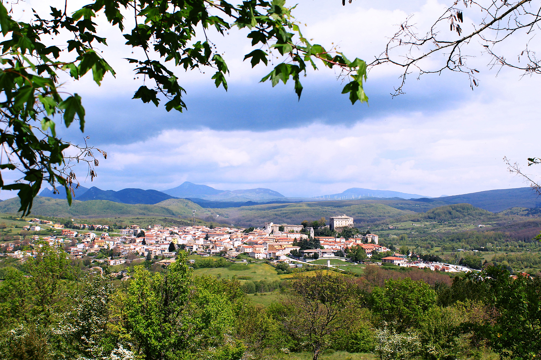 Panorama di Pescolanciano